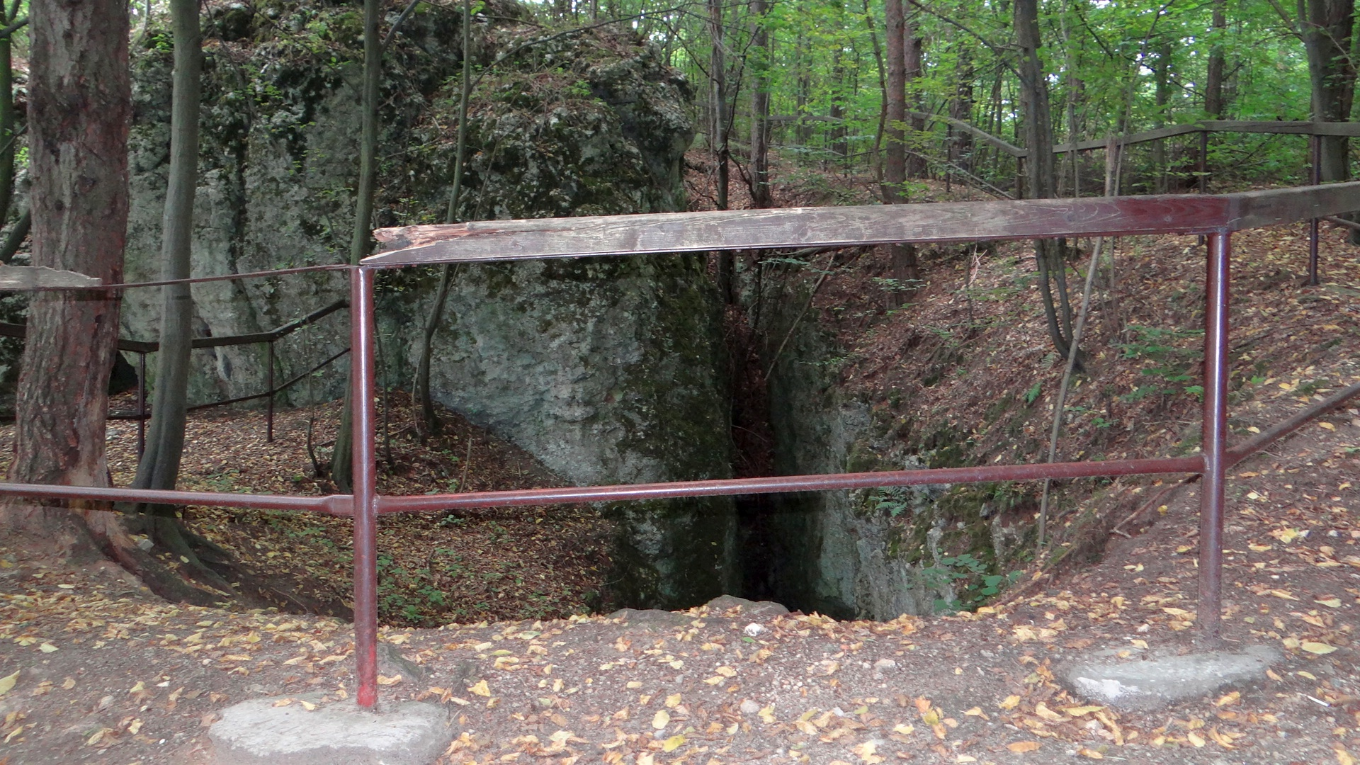 Jaskinia Wielka Studnia Szpatówców w Podlesicach